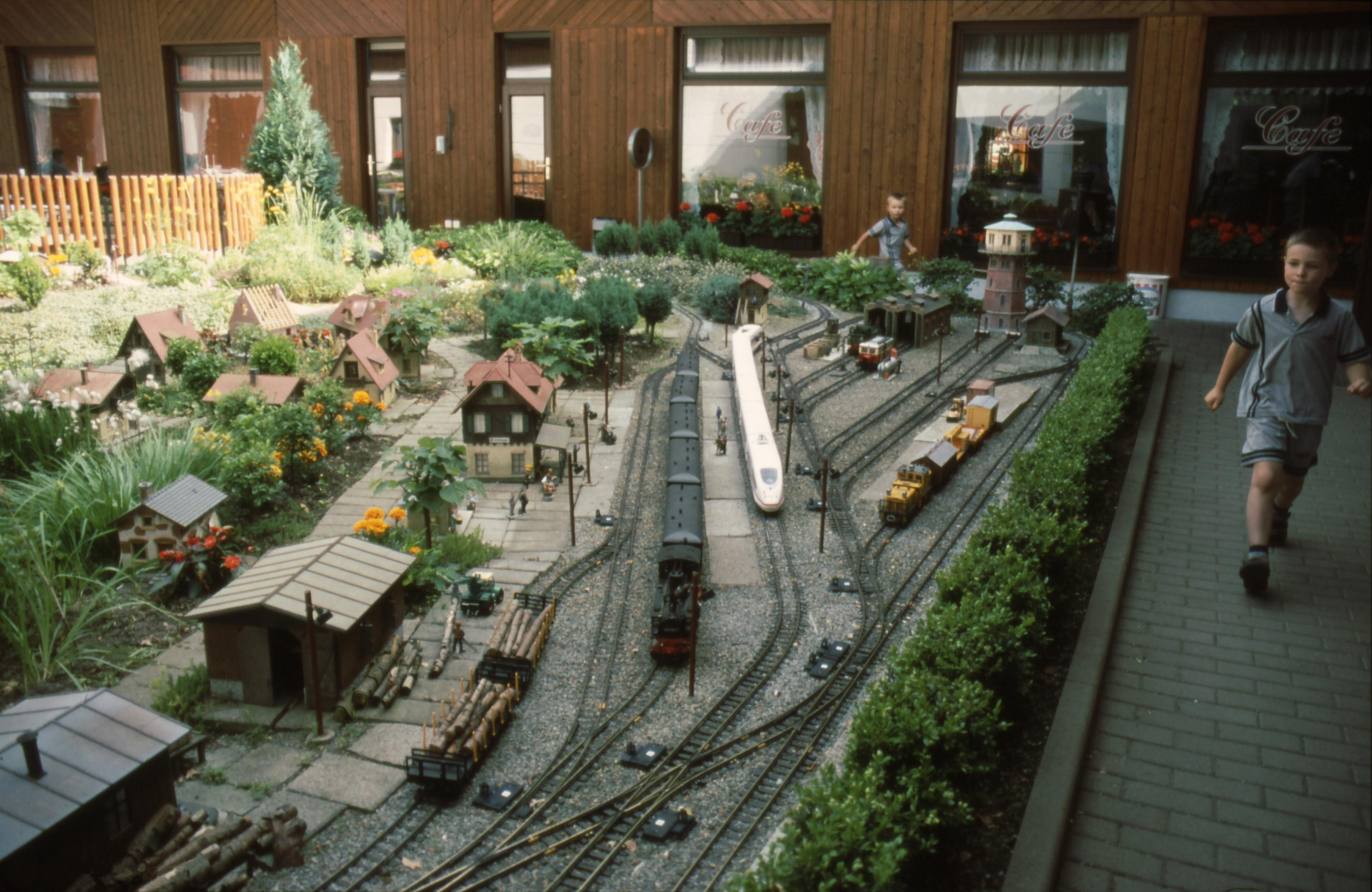 Nach dem vorsätzlich gelegtem Brand im August 1994 mußte das Bw neu gebaut werden. Im Innenhof entstand eine Modelleisenbahnanlage mit Modellen von LGB.